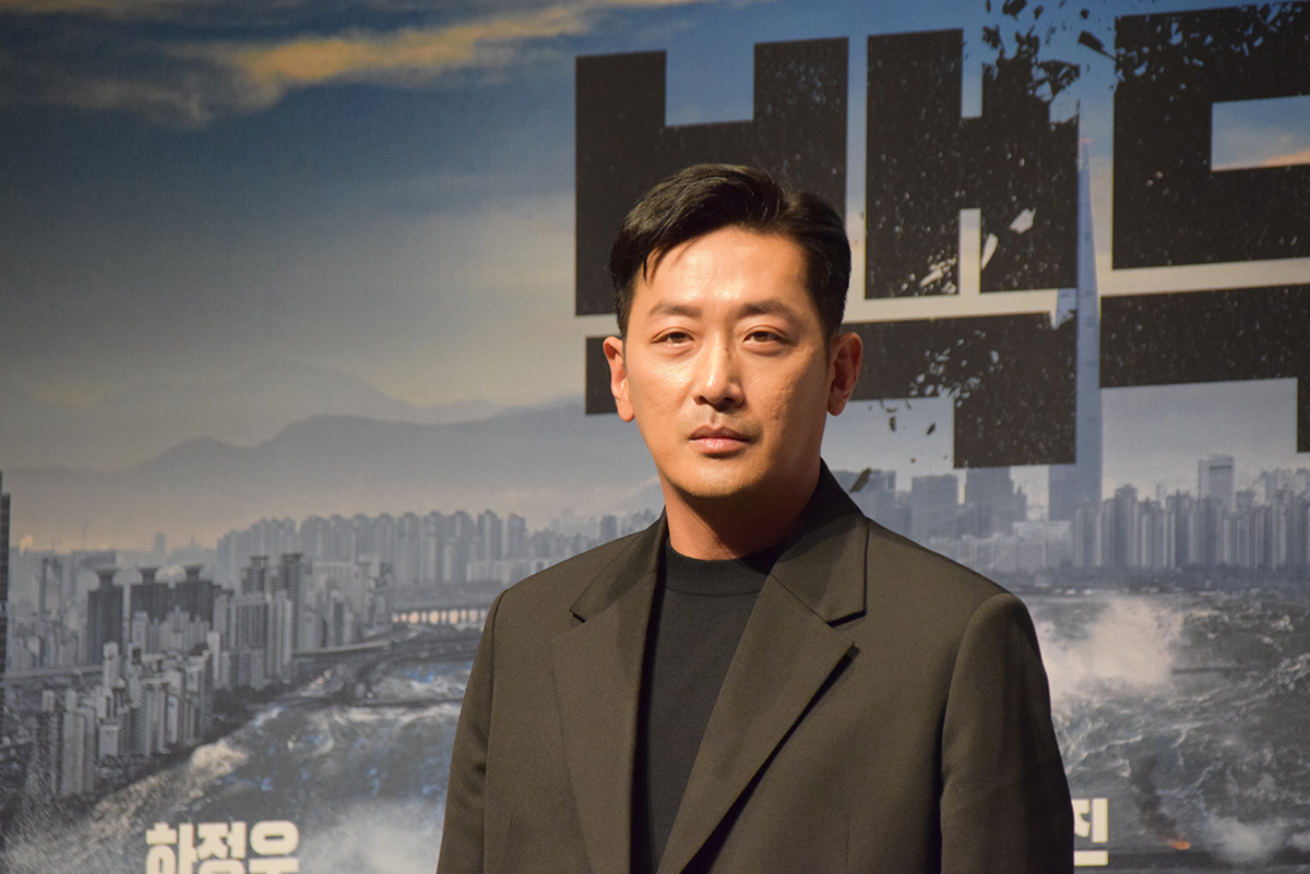 영화 '백두산' Mount Paektu 제작보고회 현장 (2019.11.19)